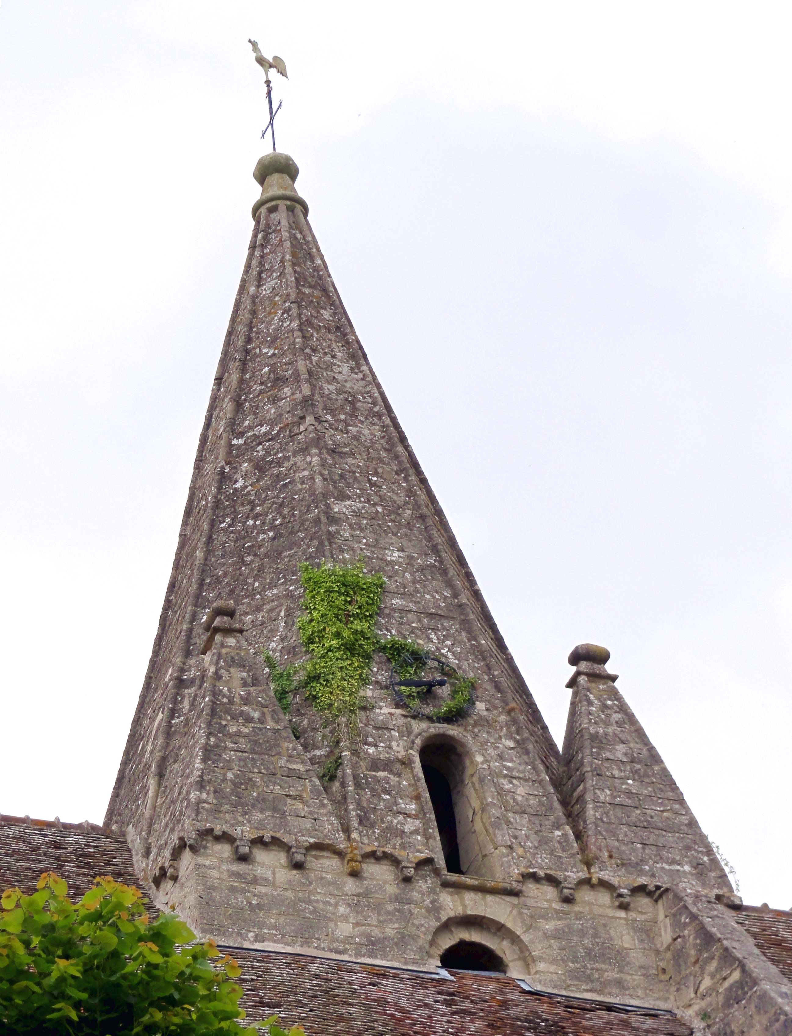 Église Saint-Gervais-et-Saint-Protais de Saint-Gervais (voir titre).